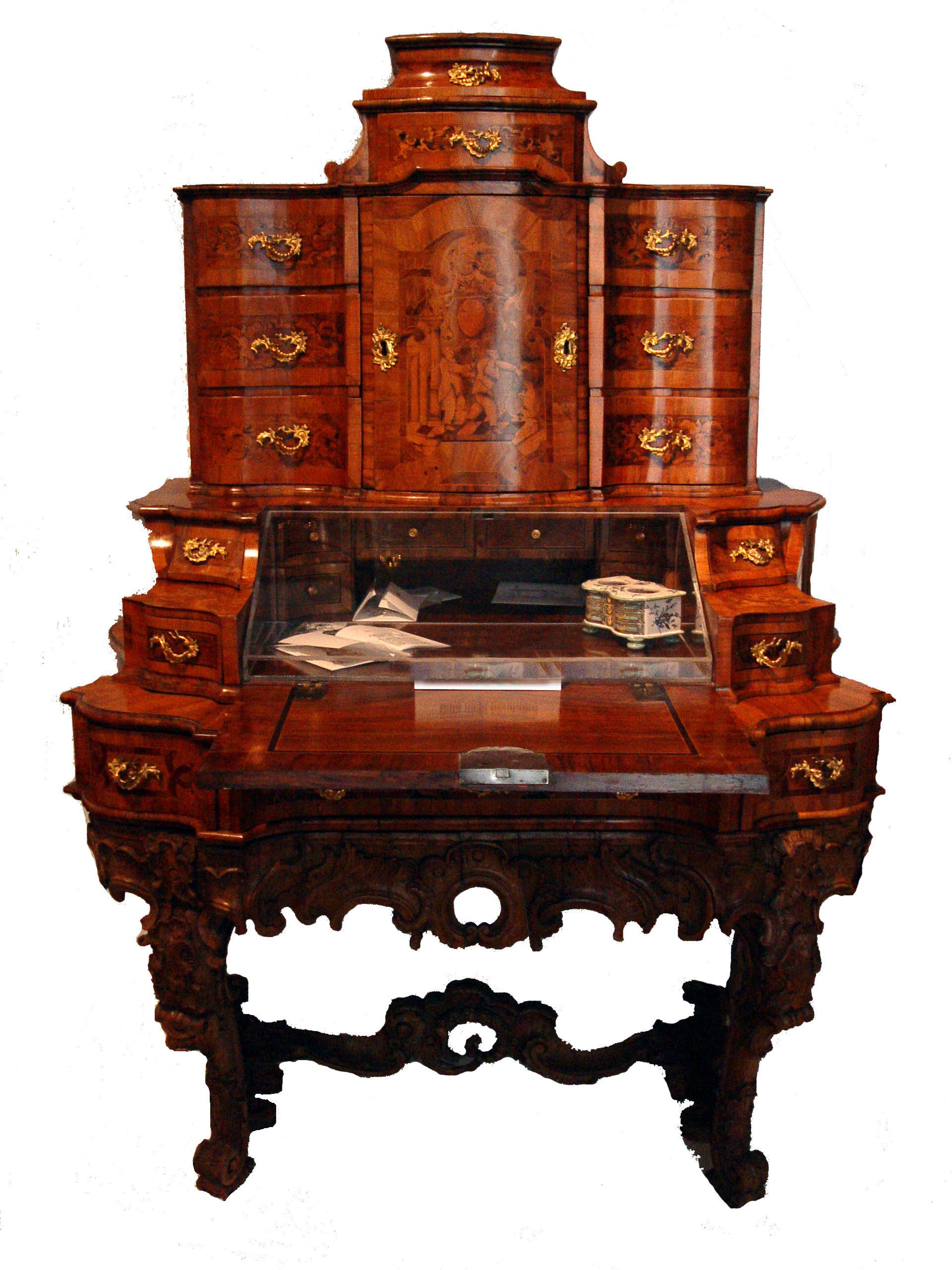 Sekretär I